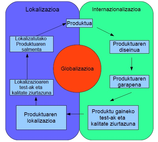 internazionalizazioa eta lokalizazioaren dituzten arremanak produktu baten bizitzan